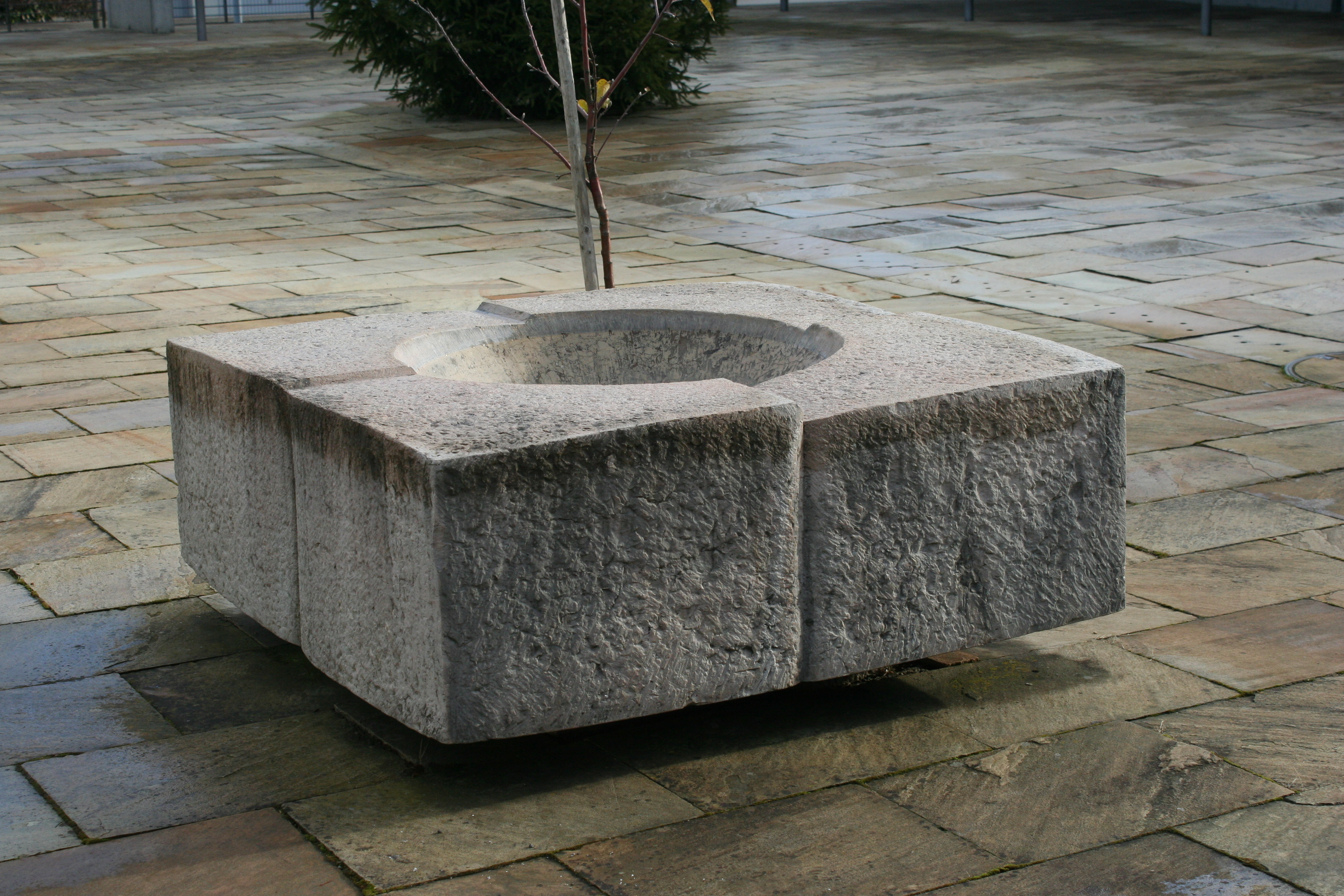 Römisch-katholische Pfarrkirche Hl. Dreifaltigkeit Zollikon, Brunnen im Aussenbereich